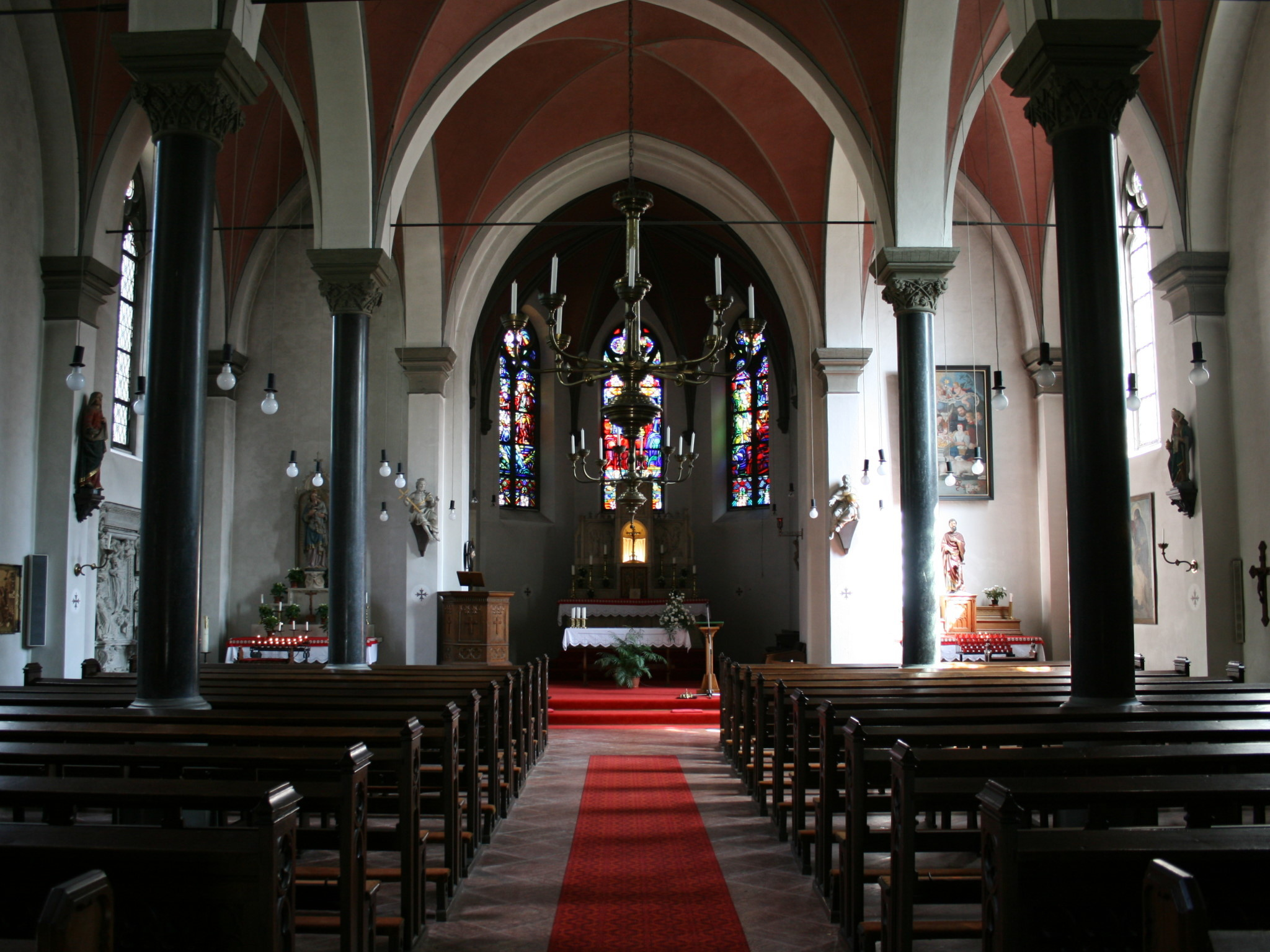 Sankt Johann Baptist in Marienheide-Gimborn